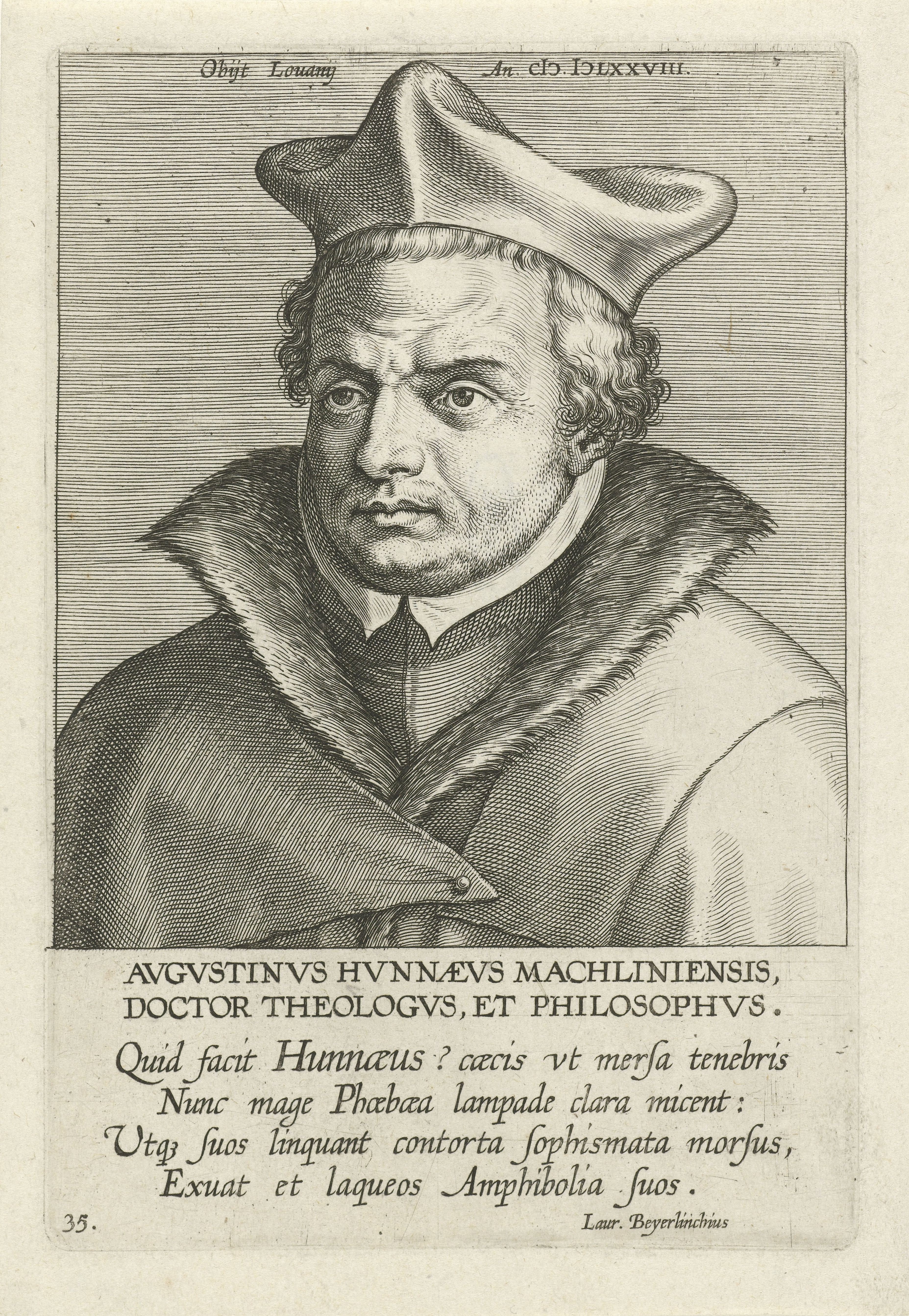 IdentificatieTitel(s): Portret van Augustinus HunaeusAvgvstinvs Hvnnaevs Machliniensis (titel op object)Portretten van beroemde Nederlandse en Vlaamse geleerden (serietitel)Illustrium Galliae Belgicae scriptorum icones et elogi (serietitel)Objecttype: prent Serienummer: 35/51Objectnummer: RP-P-1906-671Catalogusreferentie: New Hollstein Dutch fig. 27Opschriften / Merken: verzamelaarsmerk, verso midden onder, gestempeld: Lugt 2228Omschrijving: Portret van Augustinus Hunaeus, Leuvense professor theologie. Buste naar links. De prent heeft een Latijns boven- en onderschrift en maakt deel uit van een serie van beroemde Nederlandse en Vlaamse geleerden.VervaardigingVervaardiger: prentmaker: Philips Galle (toegeschreven aan atelier van)schrijver: Laurens Beyerlinck (vermeld op object)uitgever: Philips Galle (mogelijk)uitgever: Theodoor Galle (mogelijk)Plaats vervaardiging: AntwerpenDatering: 1604 - 1608Fysieke kenmerken: gravureMateriaal: papier Techniek: graveren (drukprocedé)Afmetingen: plaatrand: b 114 mm × h 170 mmOnderwerpWie: Augustinus HunaeusVerwerving en rechtenVerwerving: aankoop 1906Copyright: Publiek domein